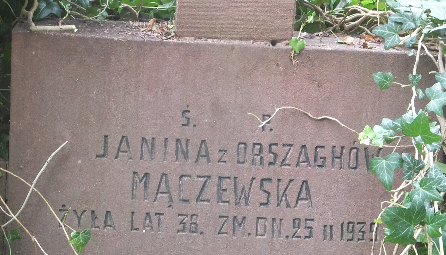 Powązki. Janina Mączewska